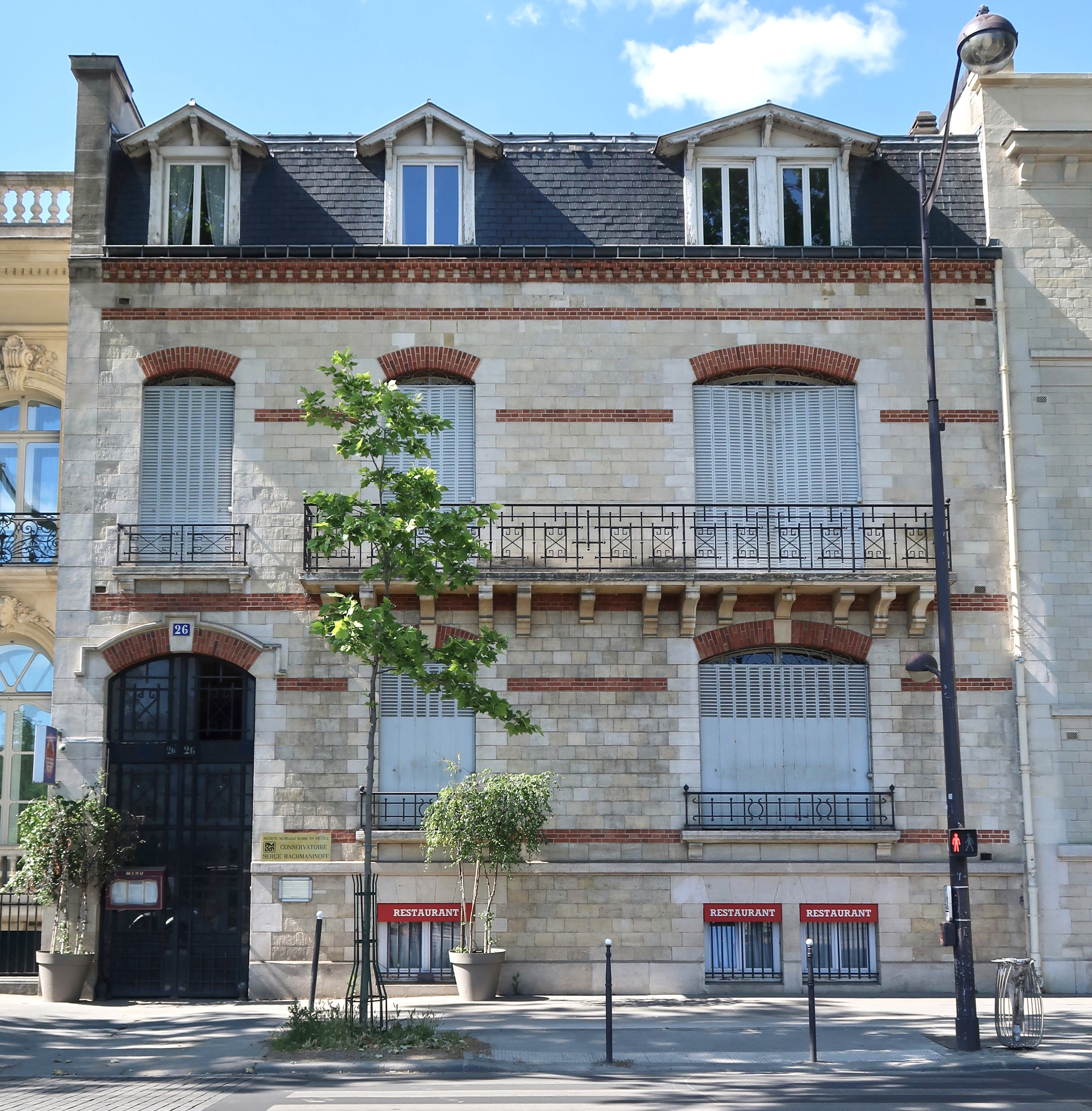 26 avenue de New-York (Paris, 16e) : Conservatoire russe de Paris Serge-Rachmaninoff.